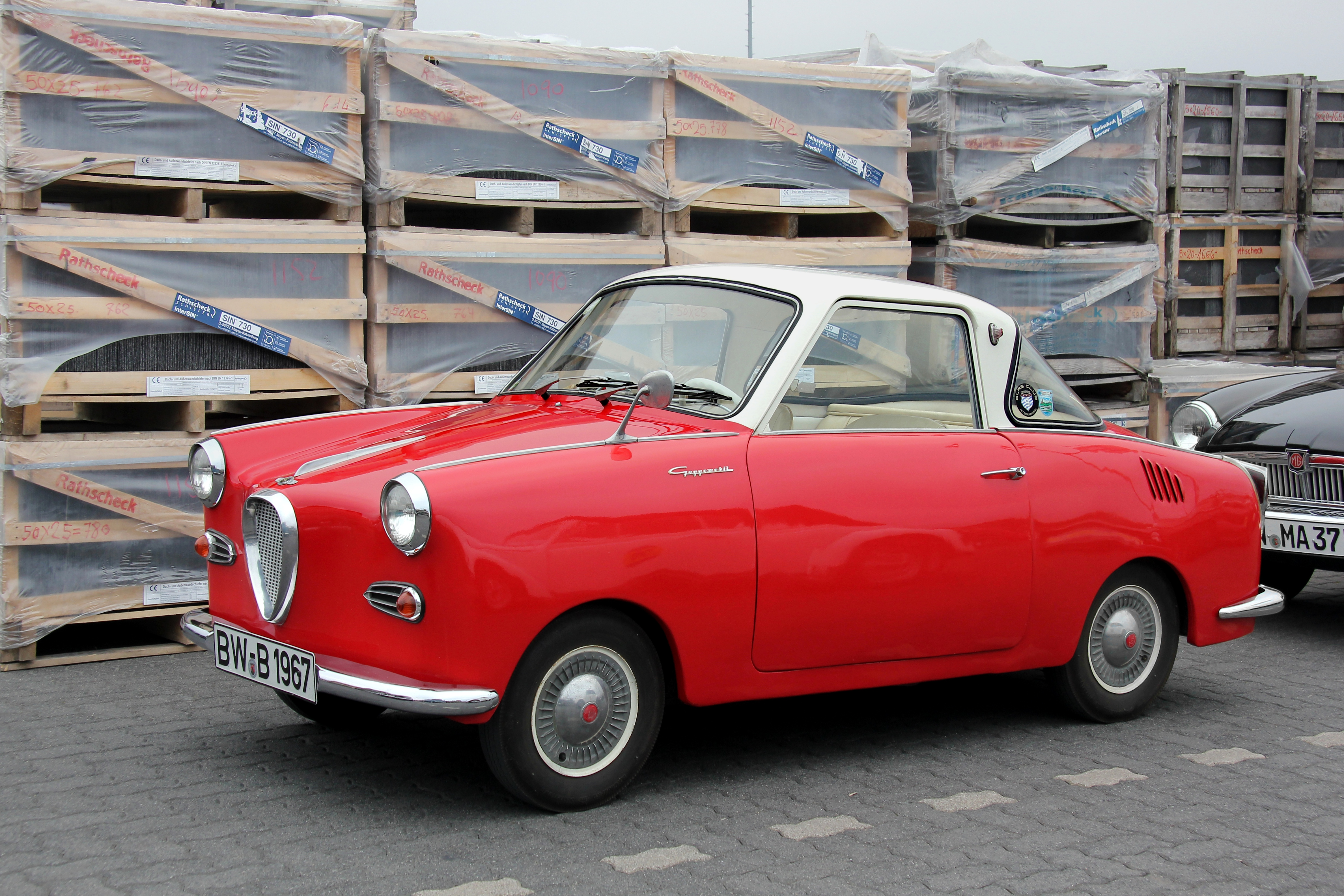 Das Goggomobil-Coupé war ein zweisitziger Kleinstwagen mit Zweizylinder-Zweitakt-Heckmotor, 247 cm³, 13,6 PS bei 5400/min, Länge 3035 mm, Breite 1370 mm, Leergewicht (ohne Fahrer) 480 kg, Höchstgeschwindigkeit 84 km/h (amtliches Kennzeichen des Fahrzeugs verändert)